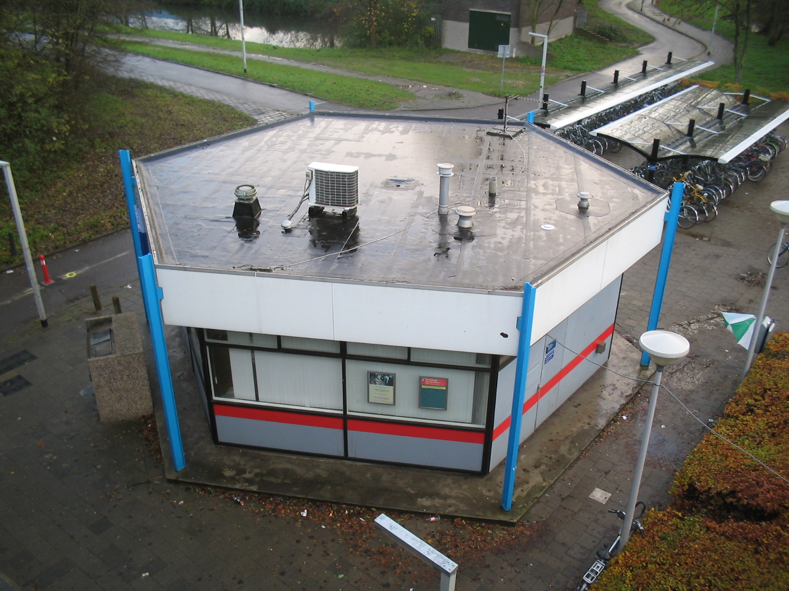 Stationsgebouw Delft Zuid, een sextant, november 2005